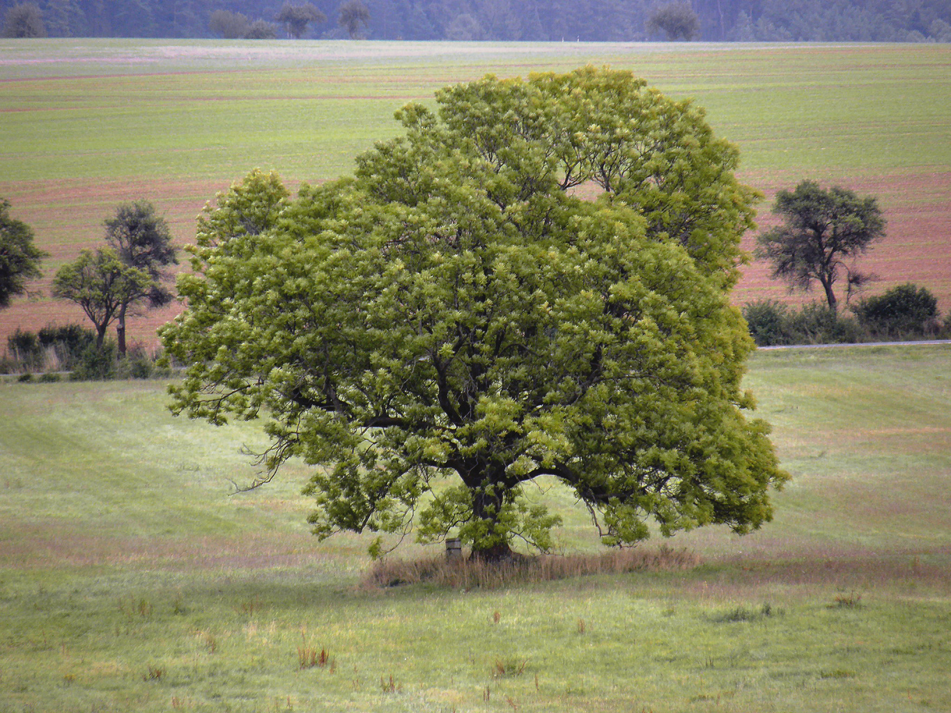 Památný jasan u Kolešova